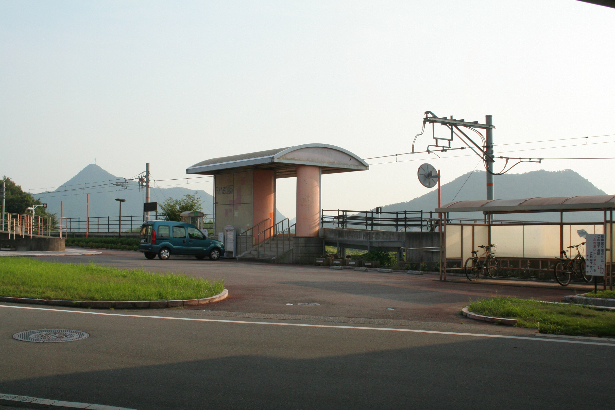 日本へそ公園駅とその周辺の風景。 東北の位置から見た駅。駅前にはある程度の広場があり、そこには美術館もあるが、北側の県道の橋と周りを山に囲まれており、アクセスするには少々苦労するかもしれない。